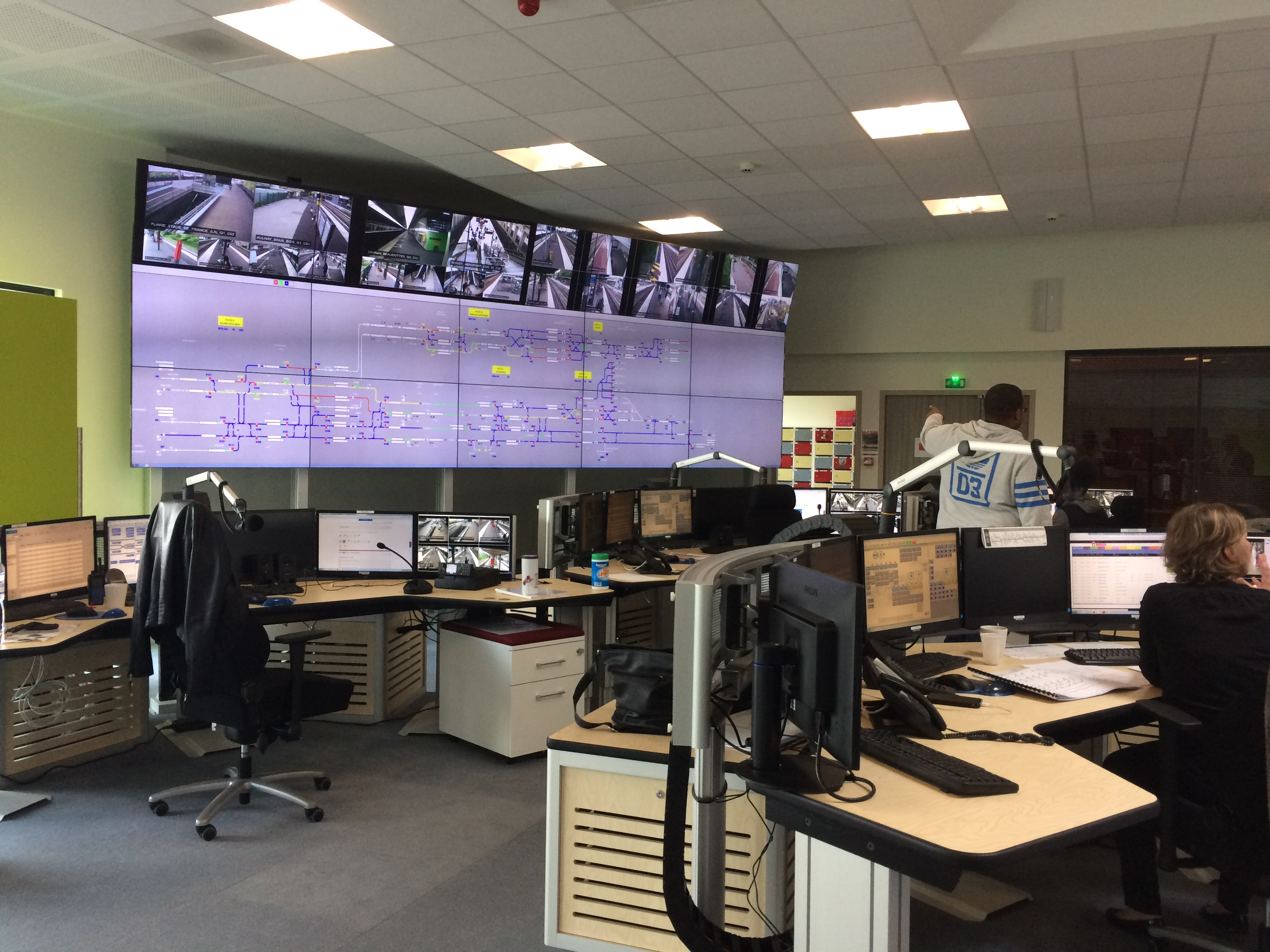 Salle du centre de commandement réseau (contrôle des aiguillages) à la gare de Saint-Denis. Poste de travail des agents d'information (PIVIF)